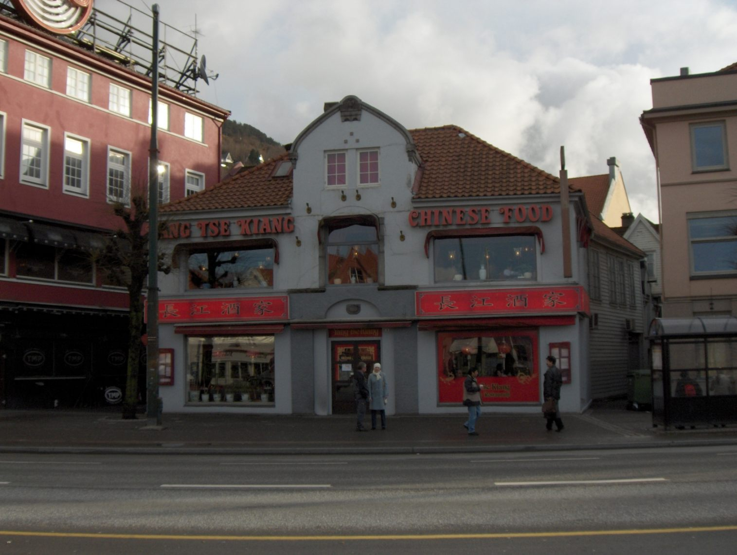 Restaurant asiatique sur Torget, Bergen. Own work, february 2006. Saty 16 novembre 2006 à 02:45 (CET)